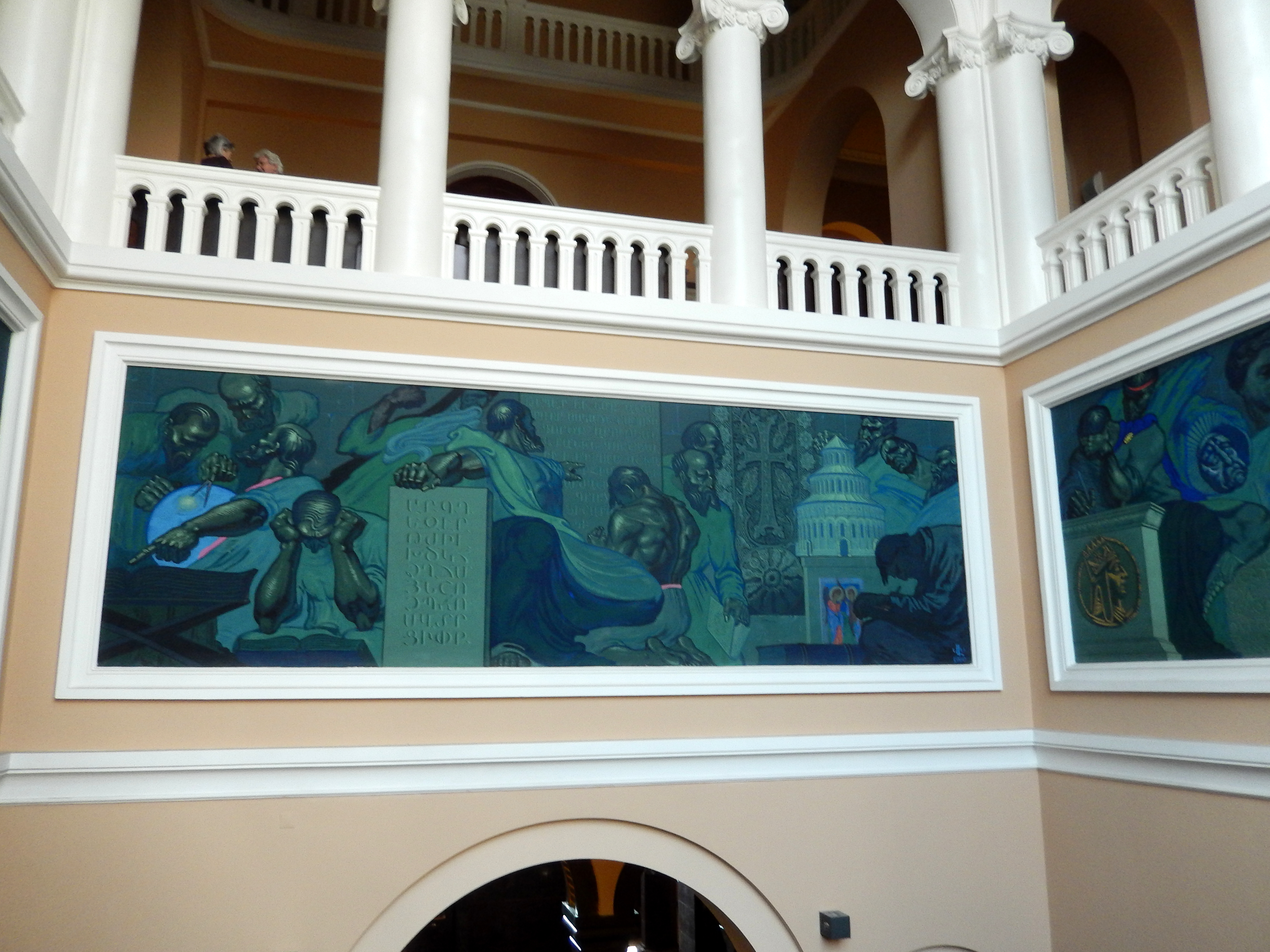 Մատենադարան, Որմնանկարներ 6/81.2